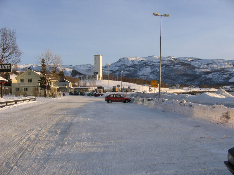 Bjerkvik, Nordland, Norway